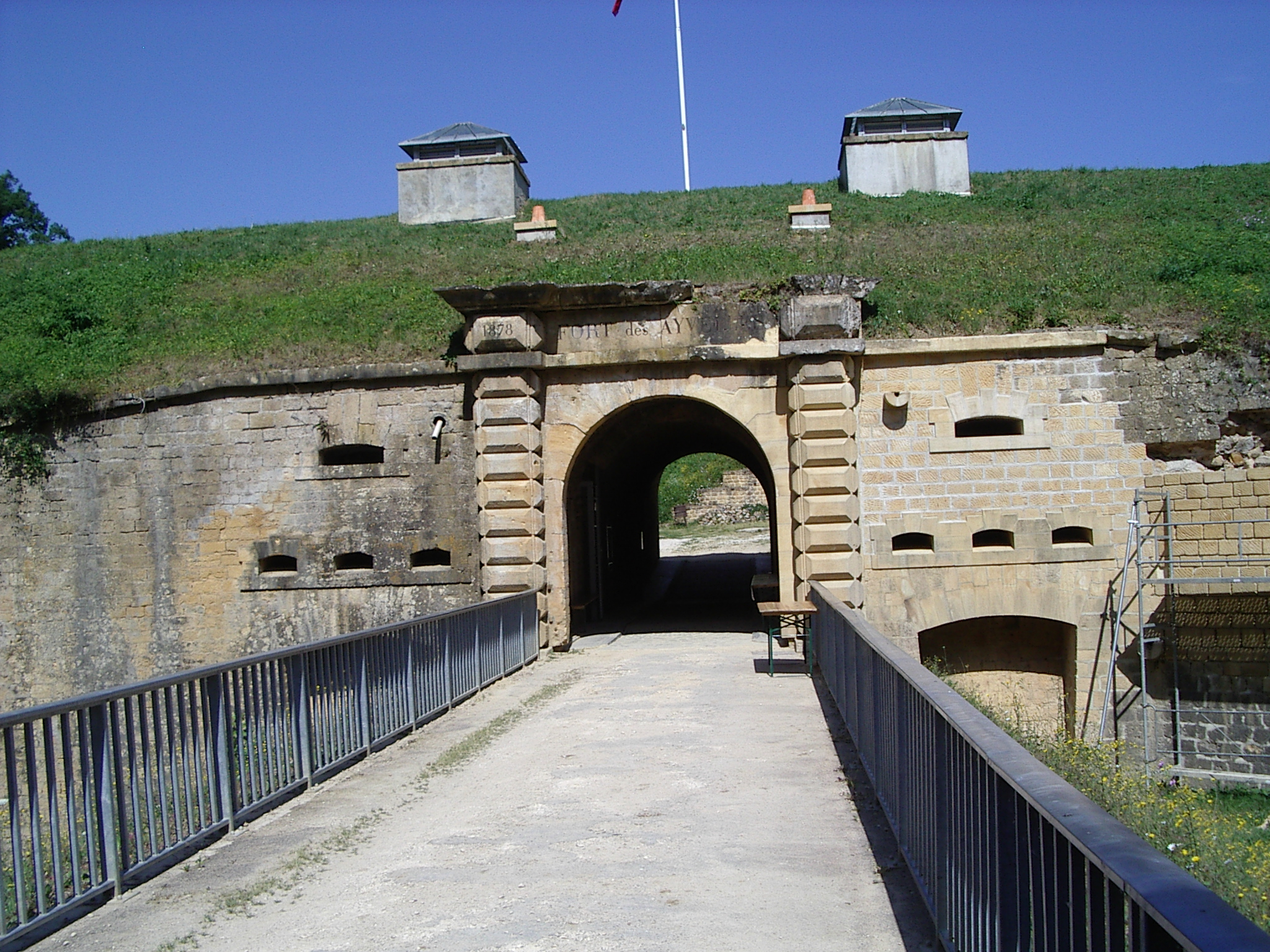 Le Fort des Ayvelles est un ouvrage militaire situé sur le territoire des communes de Villers-Semeuse et des Ayvelles dans les Ardennes.